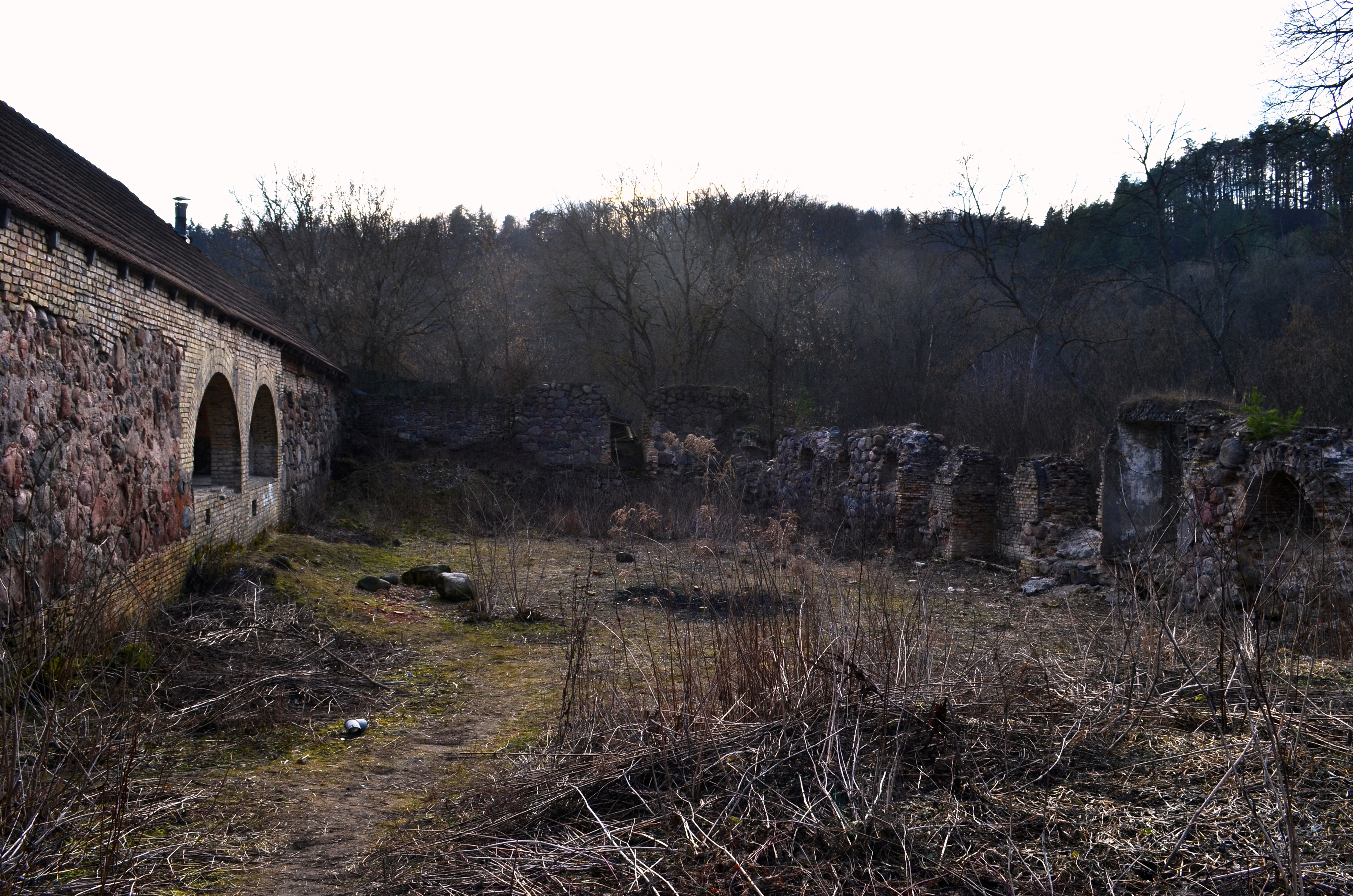 Buv. patrankų liejykla, Pūčkoriai, Vilnius